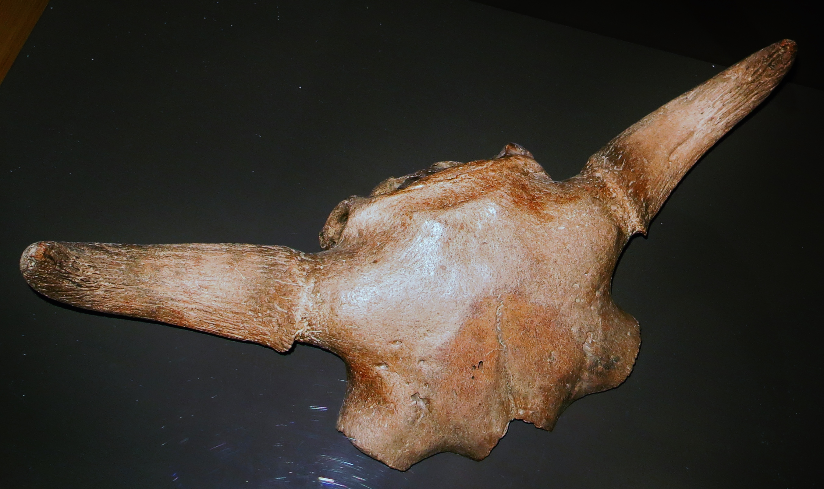 Fossil of Bison priscus - Took the picture at MUSE, Trento